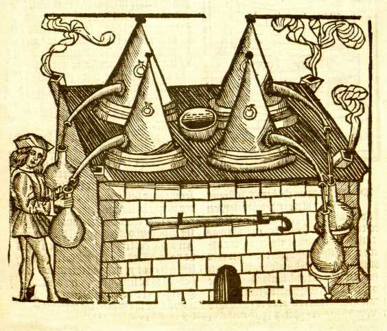 Rosenhut à 4 chapiteaux, servant à distiller des huiles essentielles.